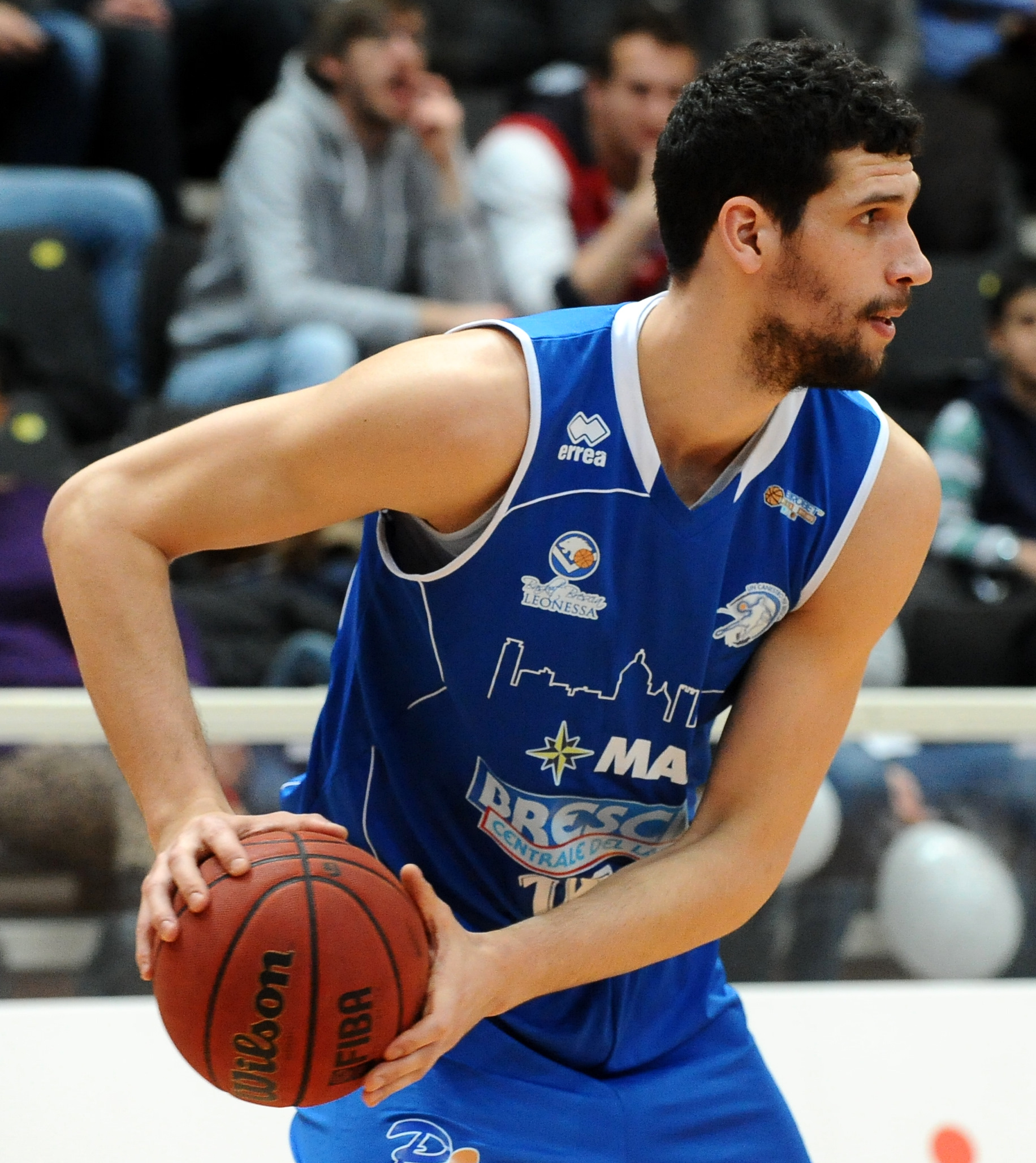 Gino Cuccarolo al PalaTrento durante una partita contro l'Aquila Basket Trento.